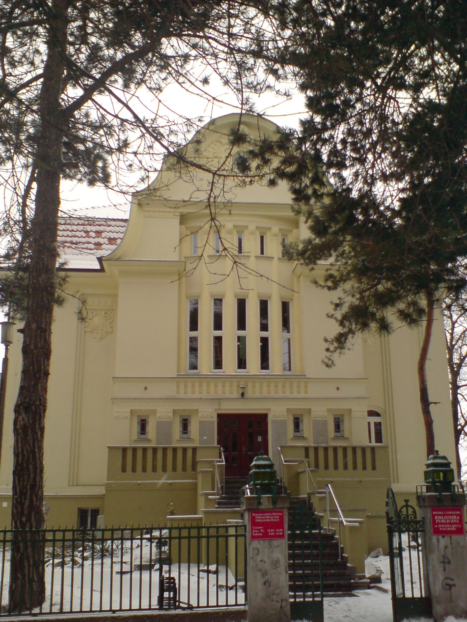 Miejska i powiatowa biblioteka w Raciborzu